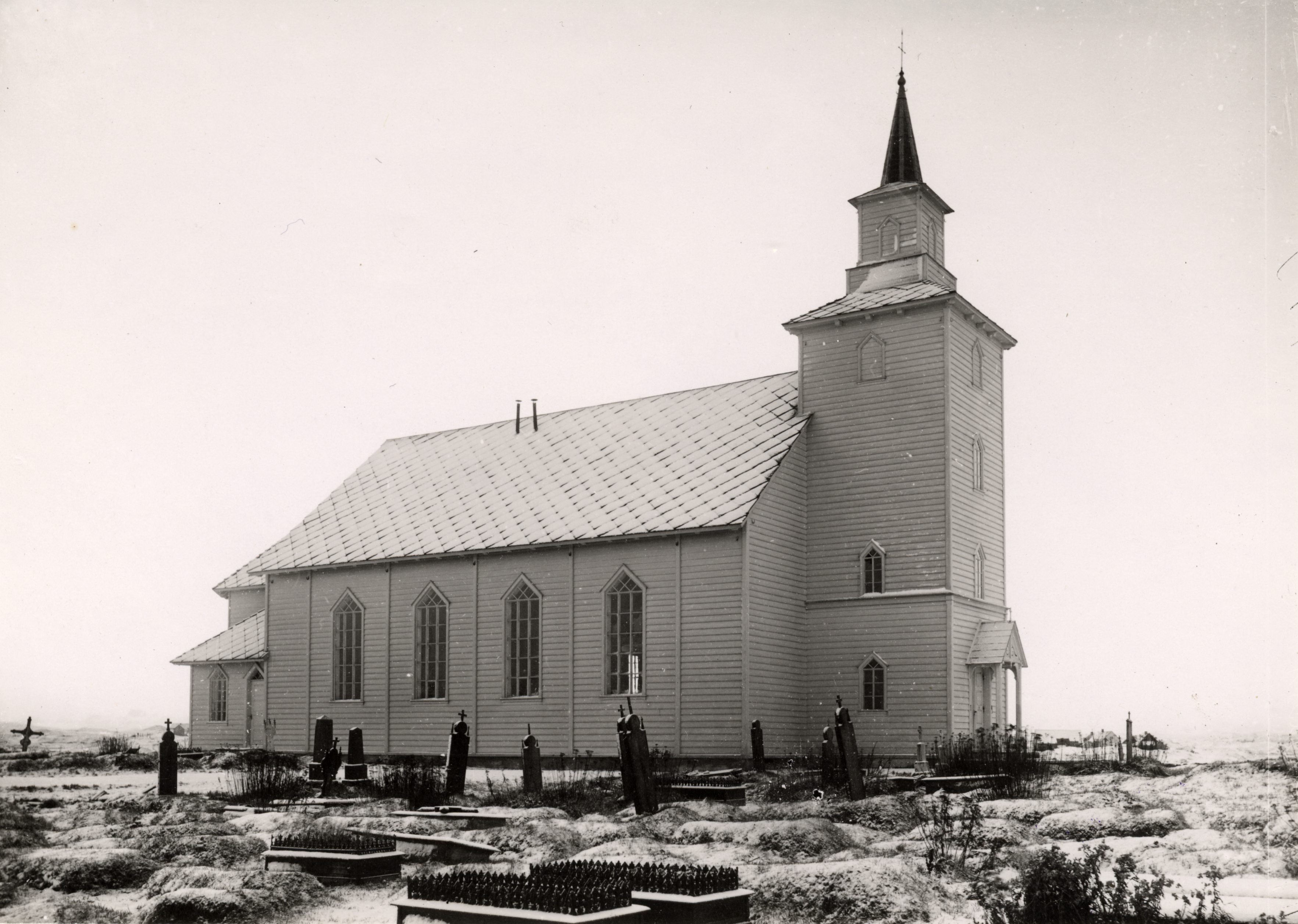 Torvastad kirke i Torvastad, Rogaland